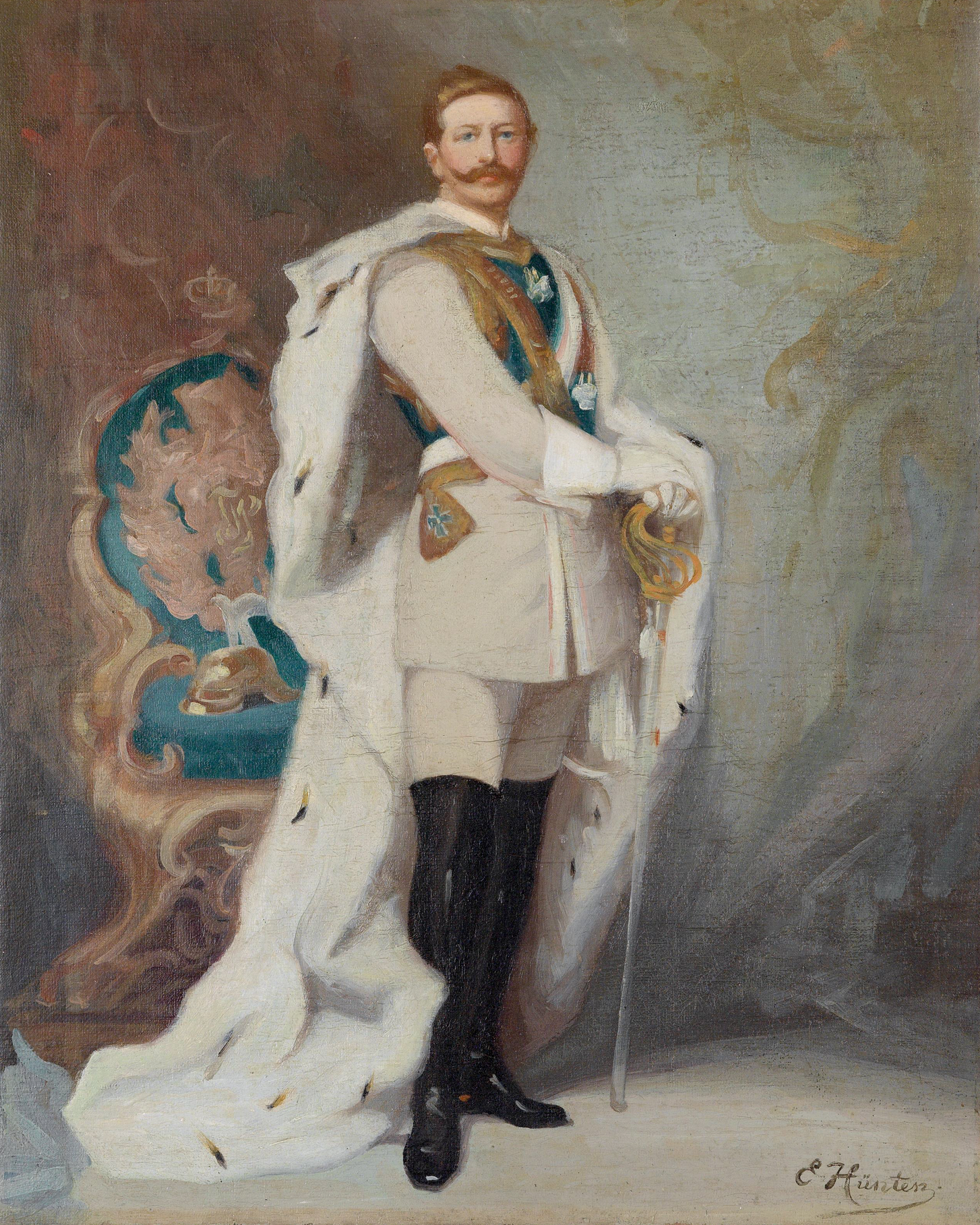 Kaiser Wilhelm II., ganzfigurige Porträtstudie des Kaisers